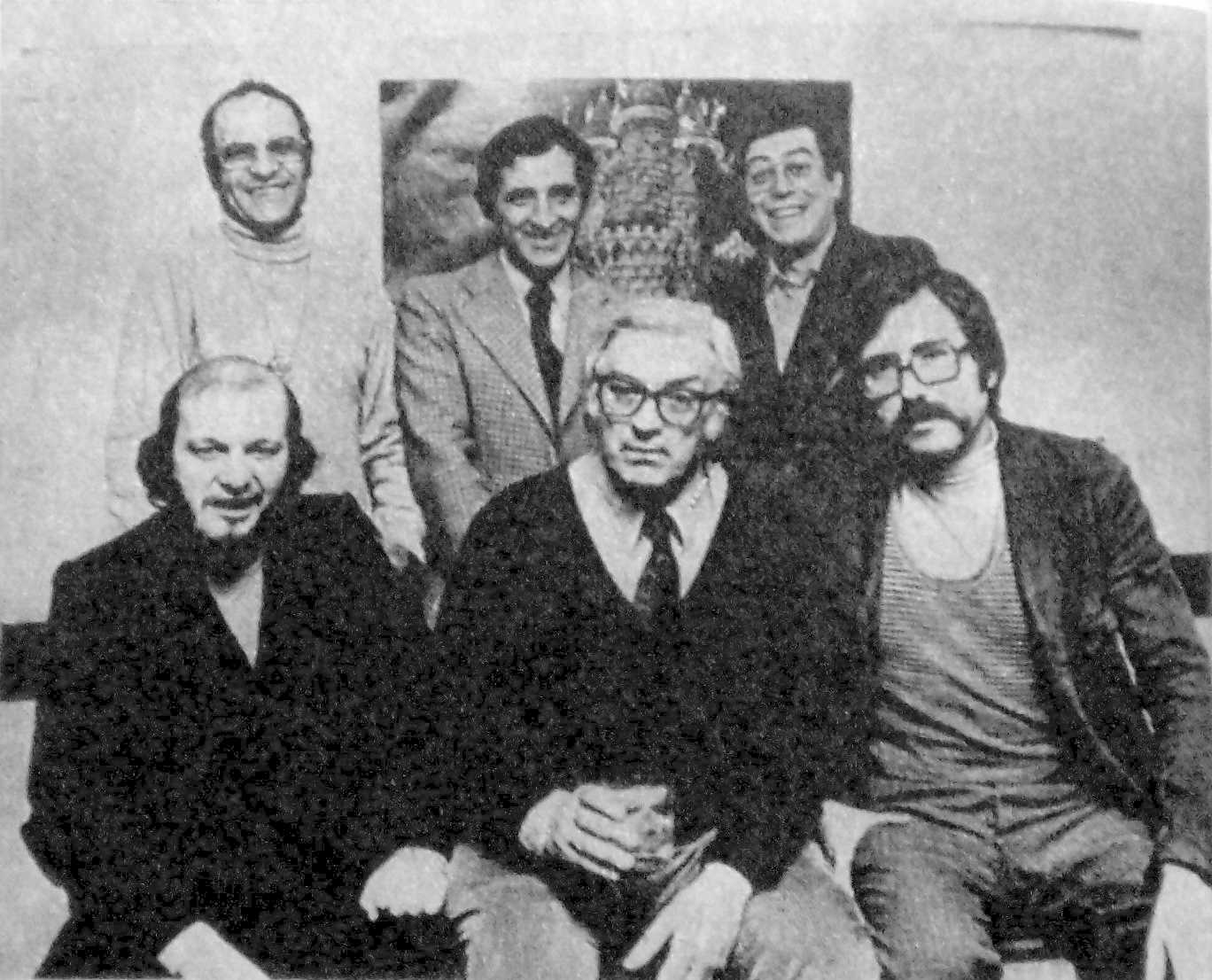 Humor gráfico argentino. Quino, Garaycochea, Bróccoli; Mordillo, Oski, Amengual